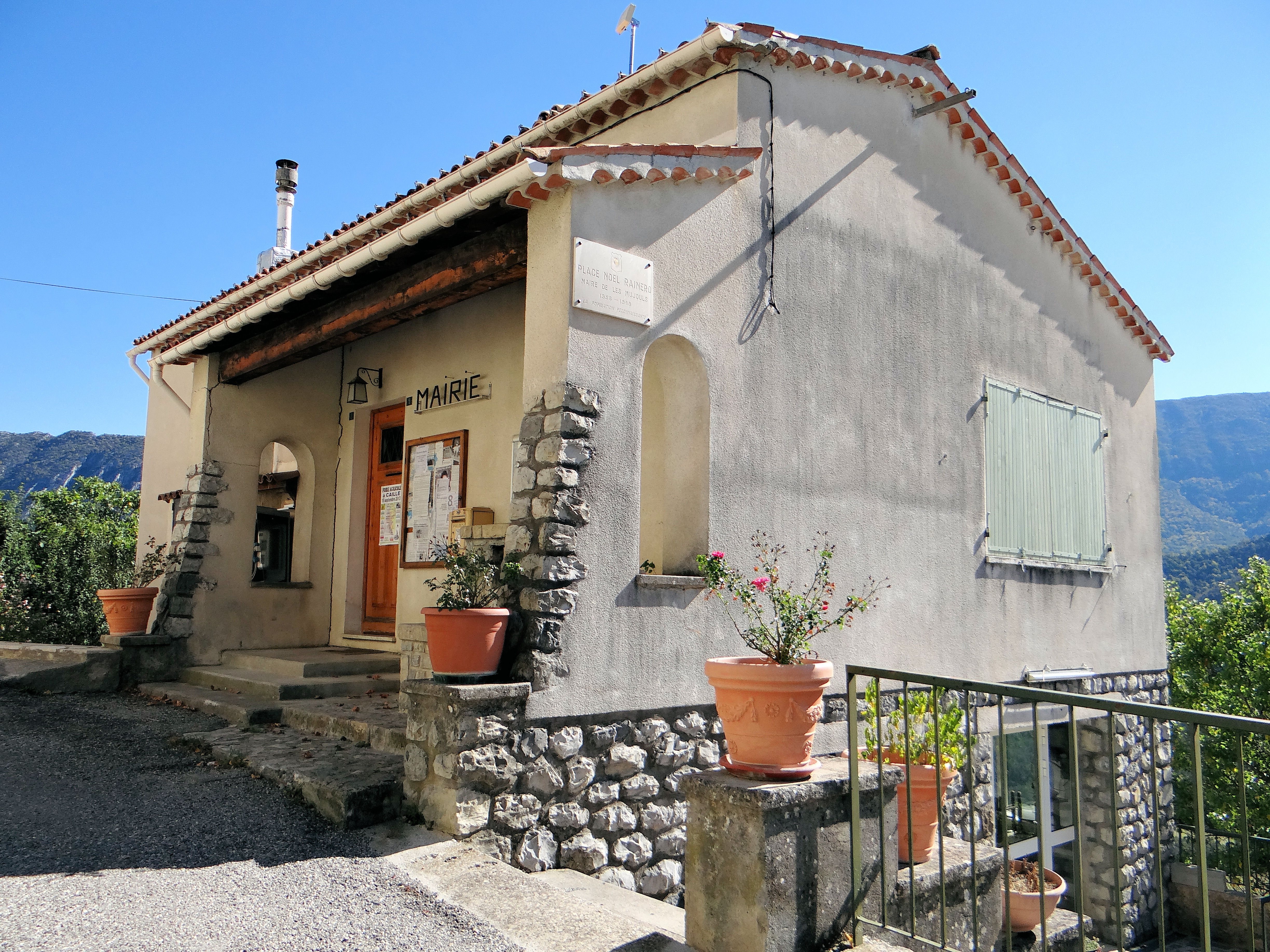 Les Mujouls - La mairie